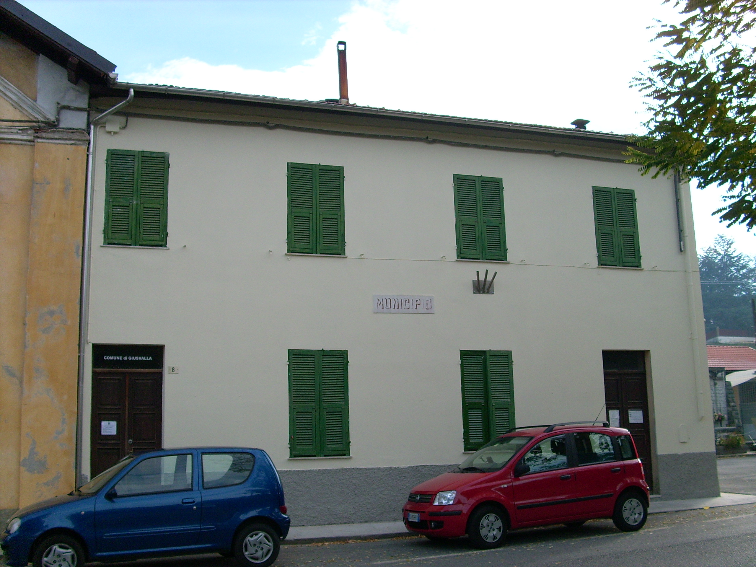 Municipio di Giusvalla, Liguria, Italia